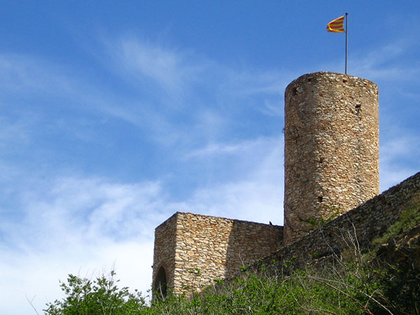 Castell moro de Vila-rodona, municipi de l'Alt Camp, Catalunya.